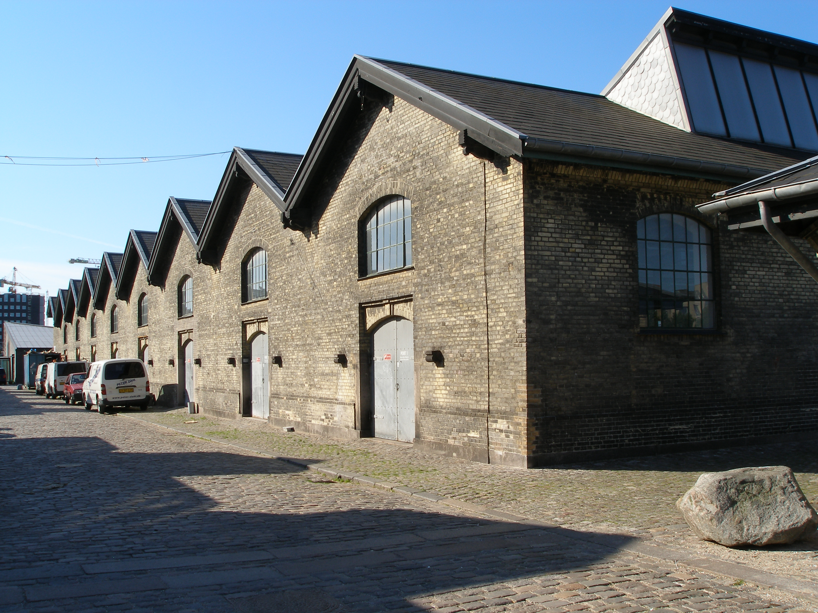 Porte til Øksnehallen